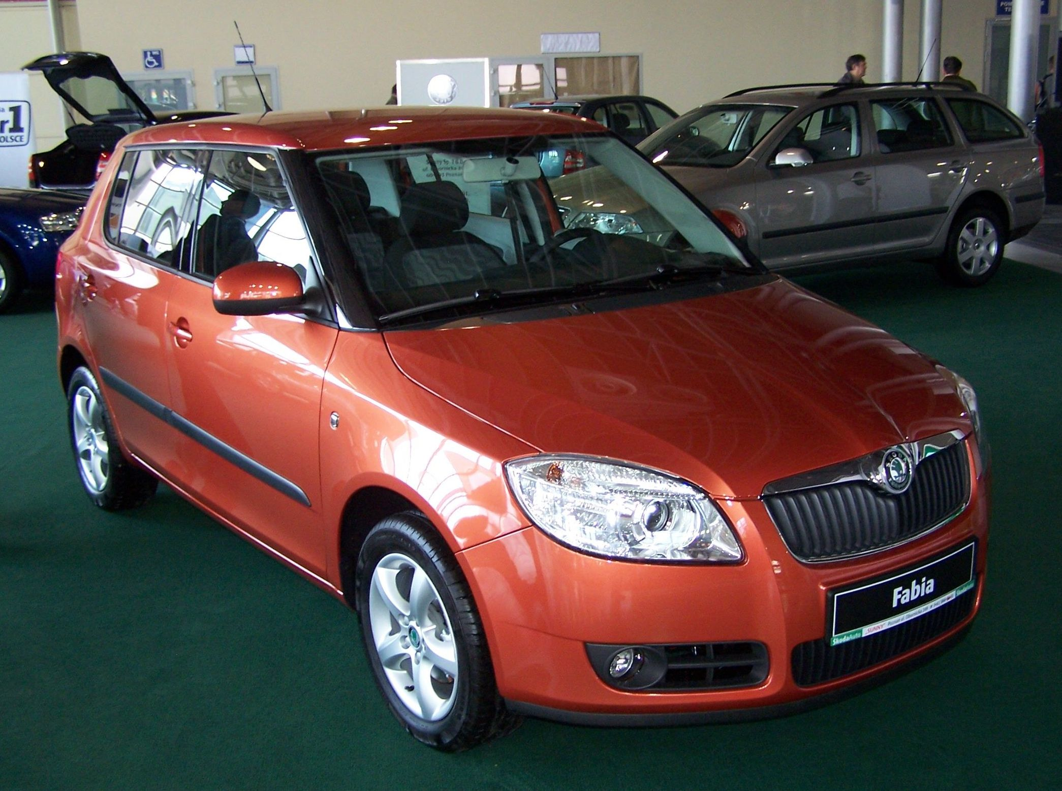 Skoda Fabia II